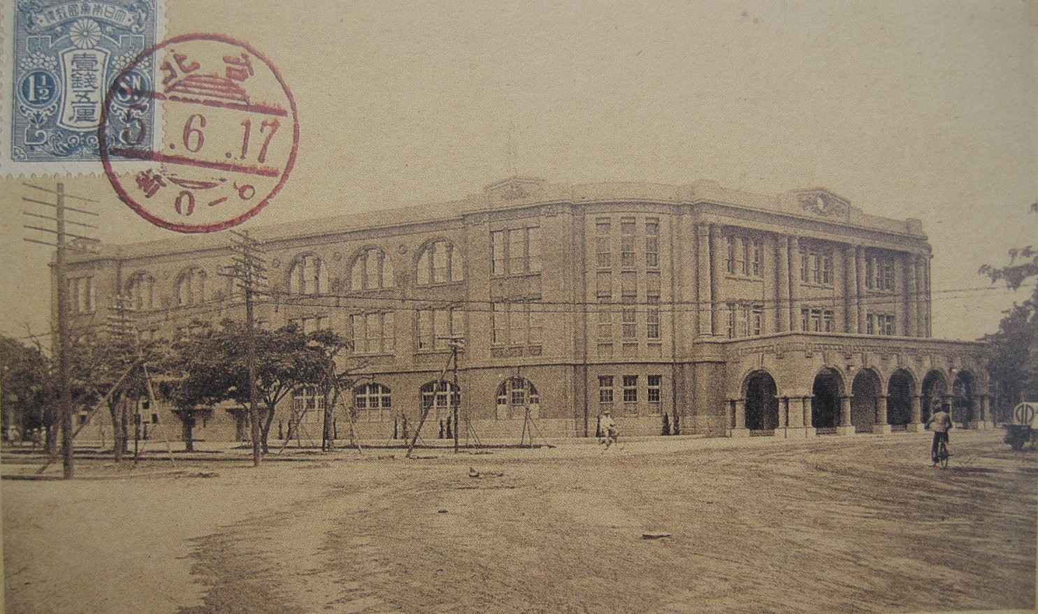 臺灣日治時期的臺北郵便局暨臺北電信局。突出的大門有五連圓拱廊，現已拆除。